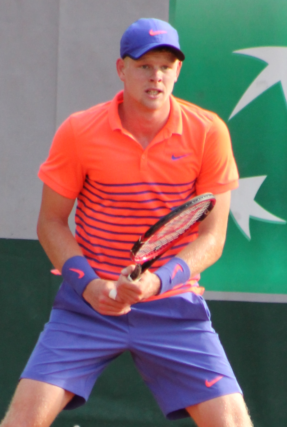 Edmund RG15 (2)